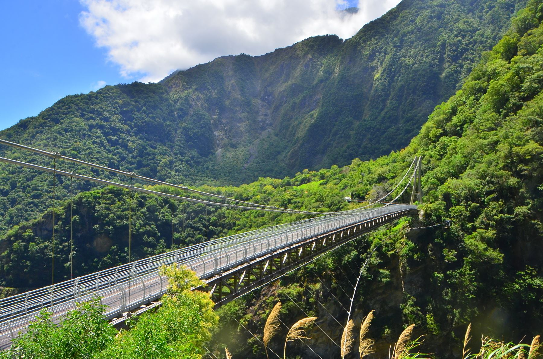 中文（台灣）: 2019年建成的新一代山月吊橋，由北側望向南側橋塔與布洛灣臺地